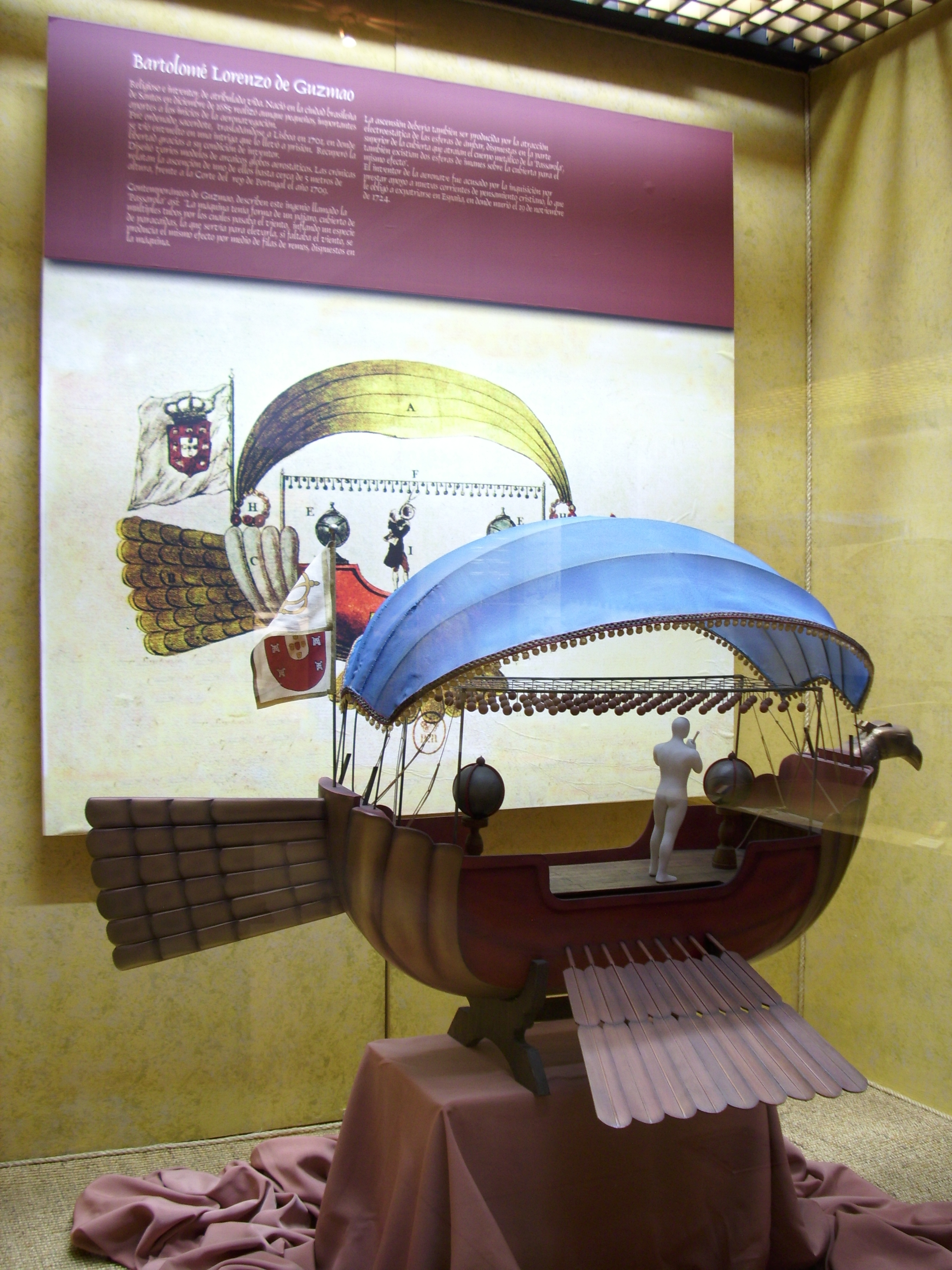 Un modelo a escala 1:10 de la Passarola, la primera aeronave de la historia en efectuar un vuelo (1709). Fue inventada por Bartolomeu Lourenço de Gusmão. Museo Nacional Aeronáutico y del Espacio. Cerrillos, Santiago de Chile.